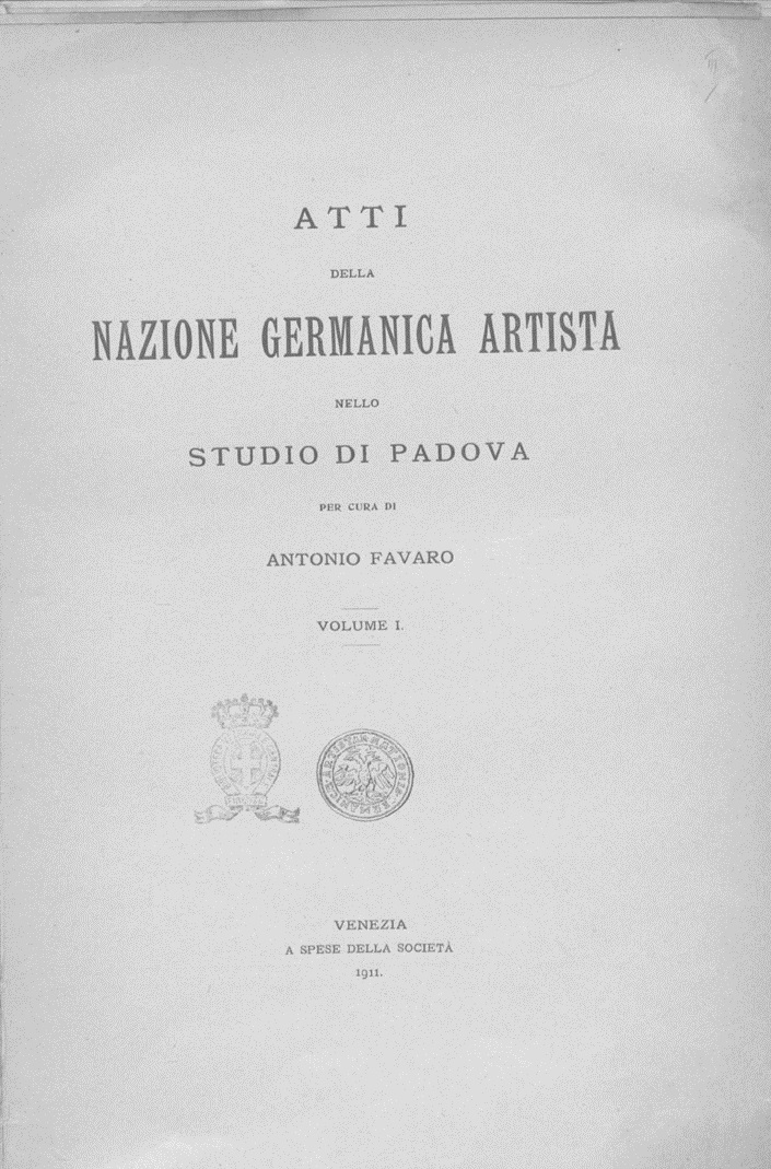 Frontespizio